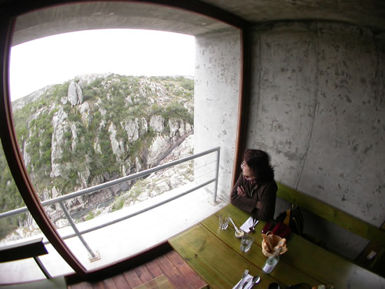 Imagen desde el parador. Salto del Penitente. Lavalleja Department, Uruguay. Author: Fernando da Rosa